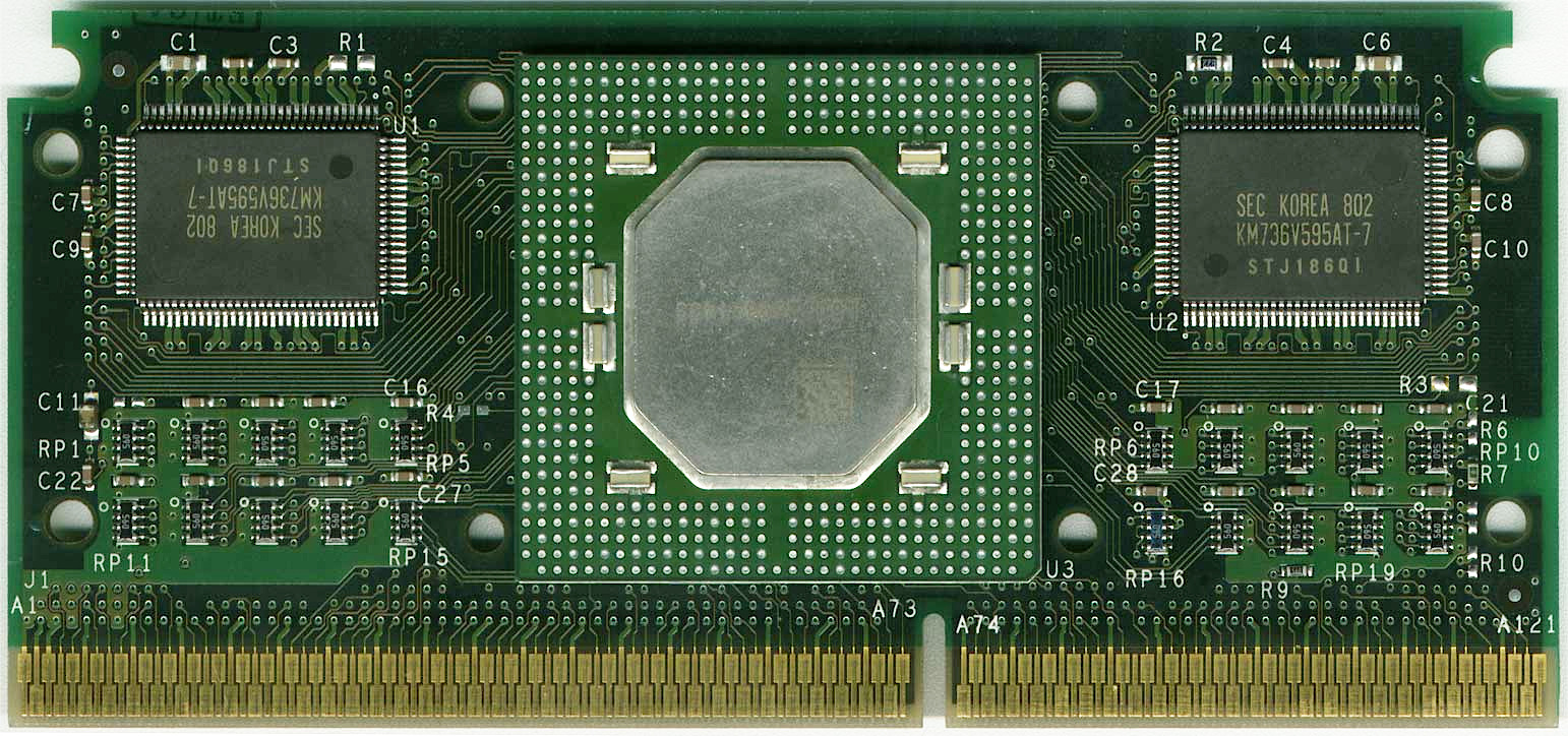 Pentium II (Klamath) 233MHz SL2HF